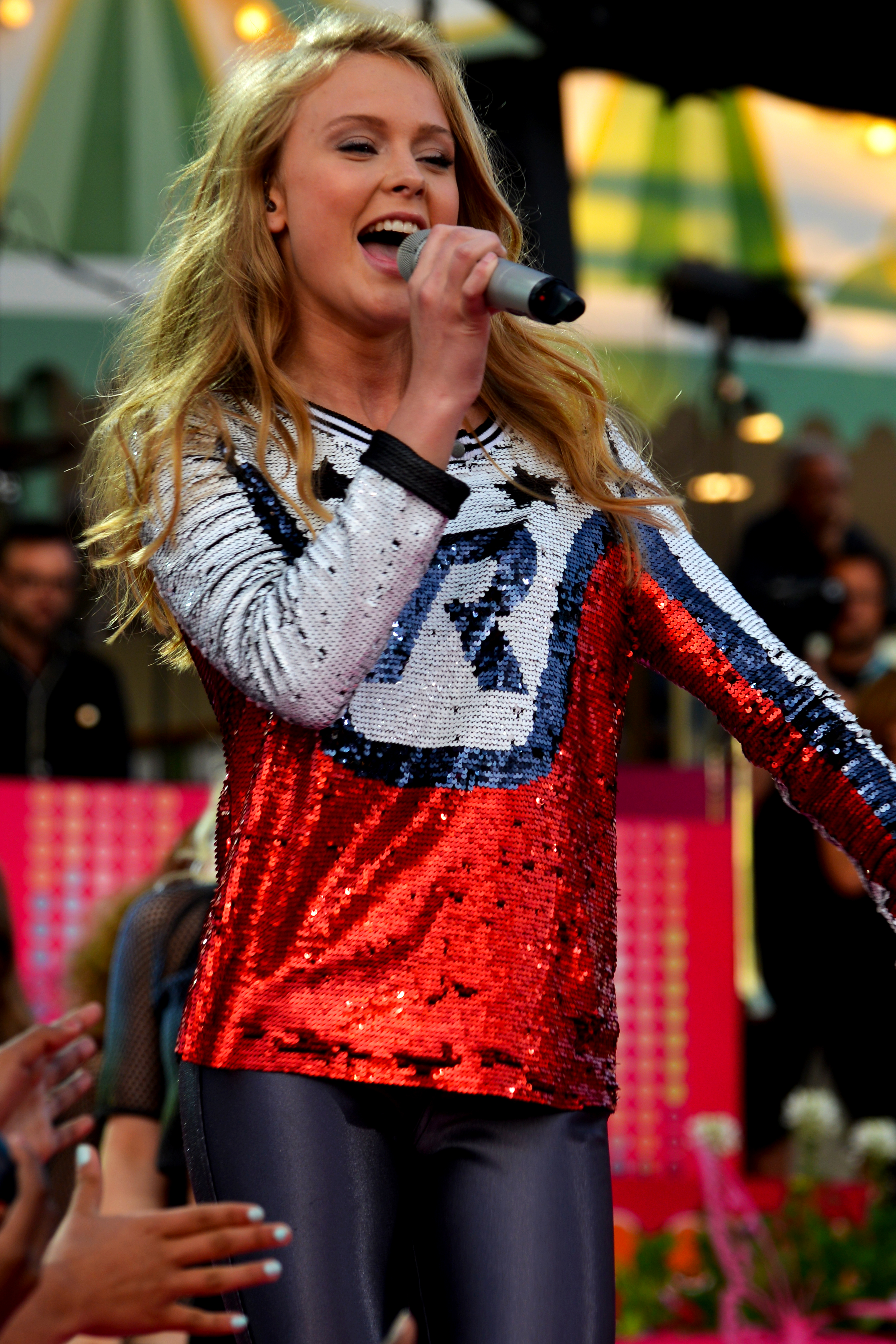 Zara Larsson uppträder på Sommarkrysset i Stockholm inne på Gröna Lund.